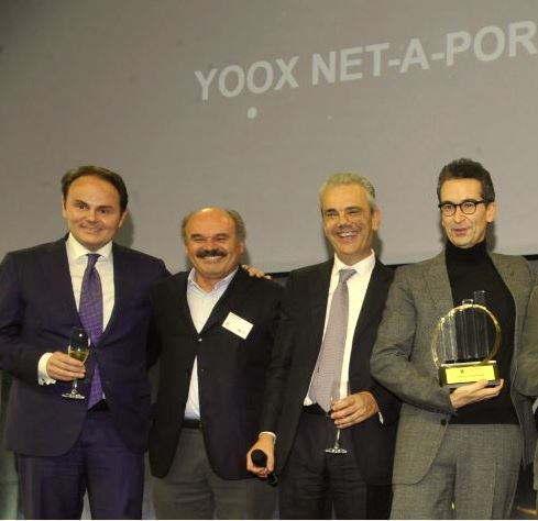 da sinistra: Matteo Lunelli, Oscar Farinetti, Donato Iacovone, Federico Marchetti (vincitore 2016)